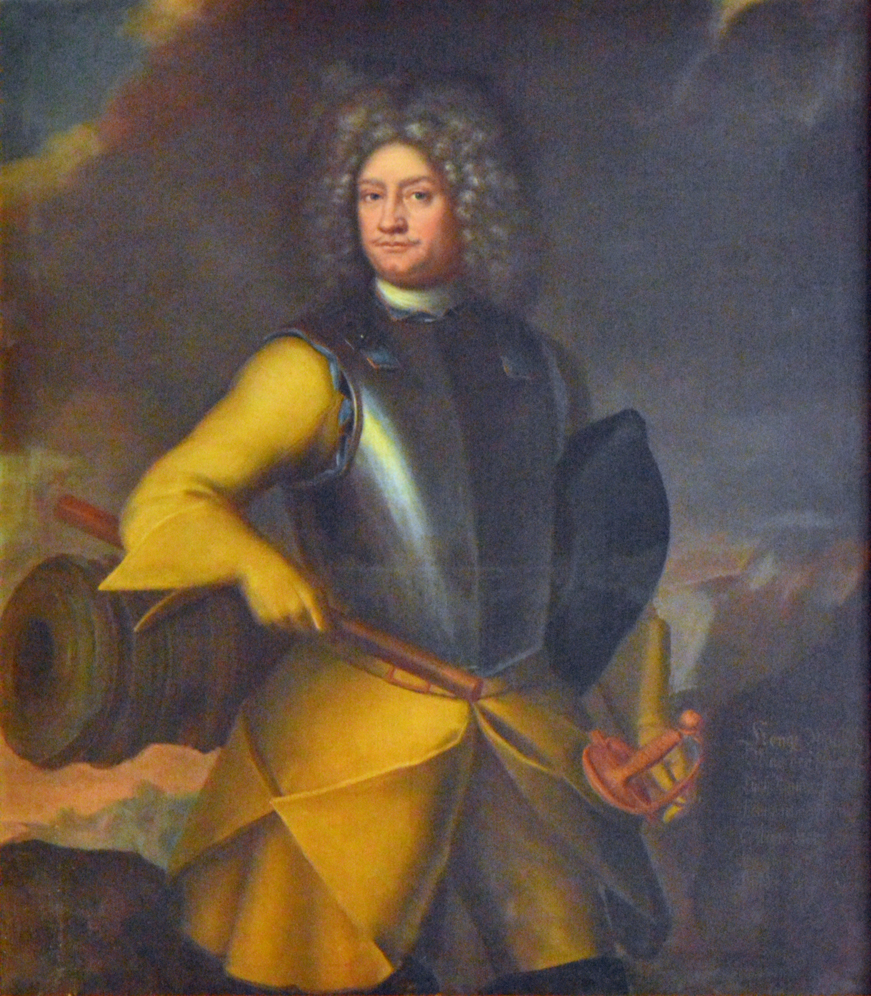 Johan Siöblad